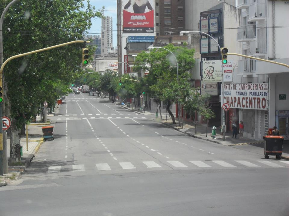 Vista de la Avenida Humberto Primo. Córdoba Capital. Argentina.